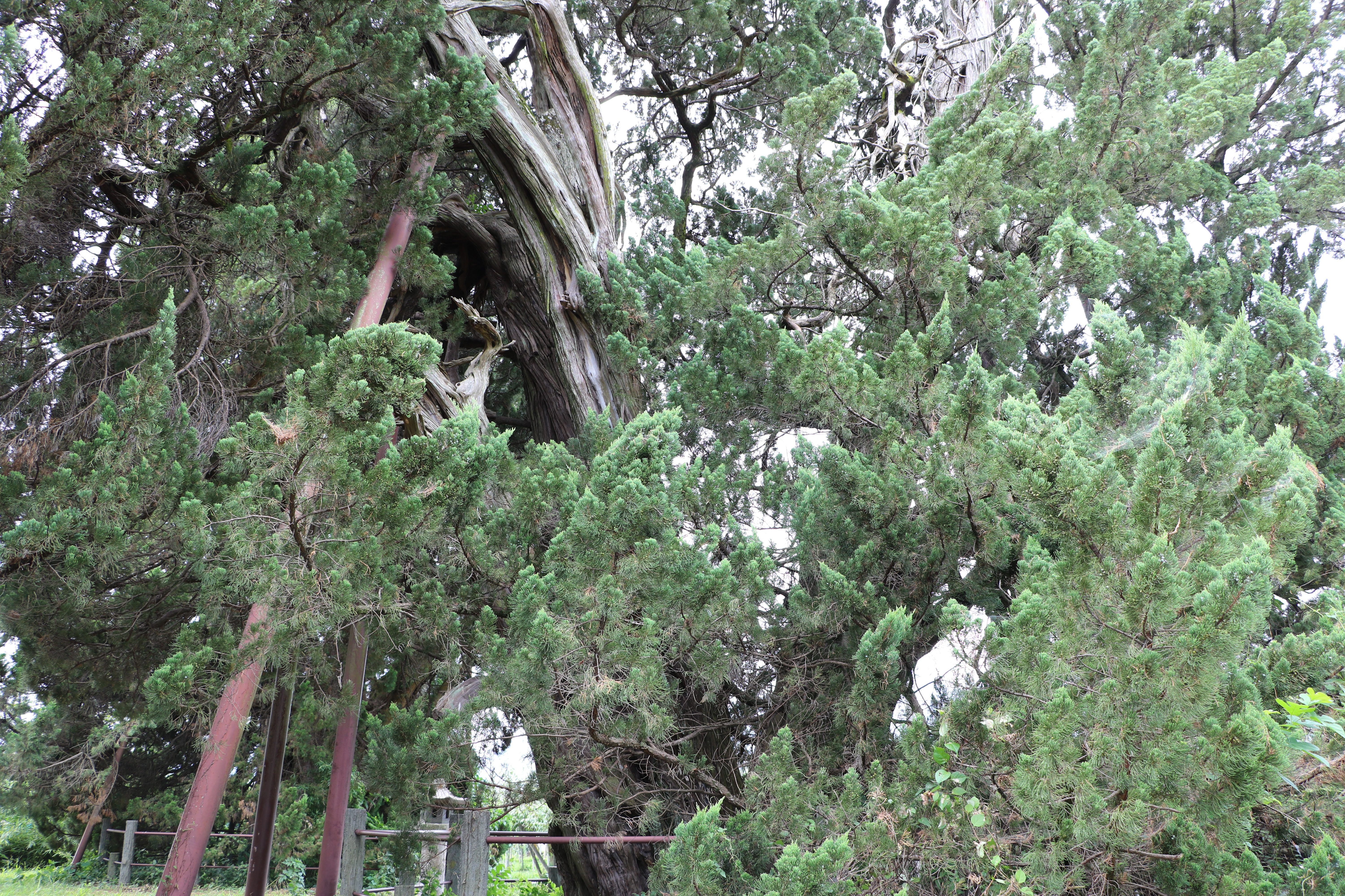 古長禅寺のビャクシンの北西の木（国指定天然記念物、山梨県南アルプス市）